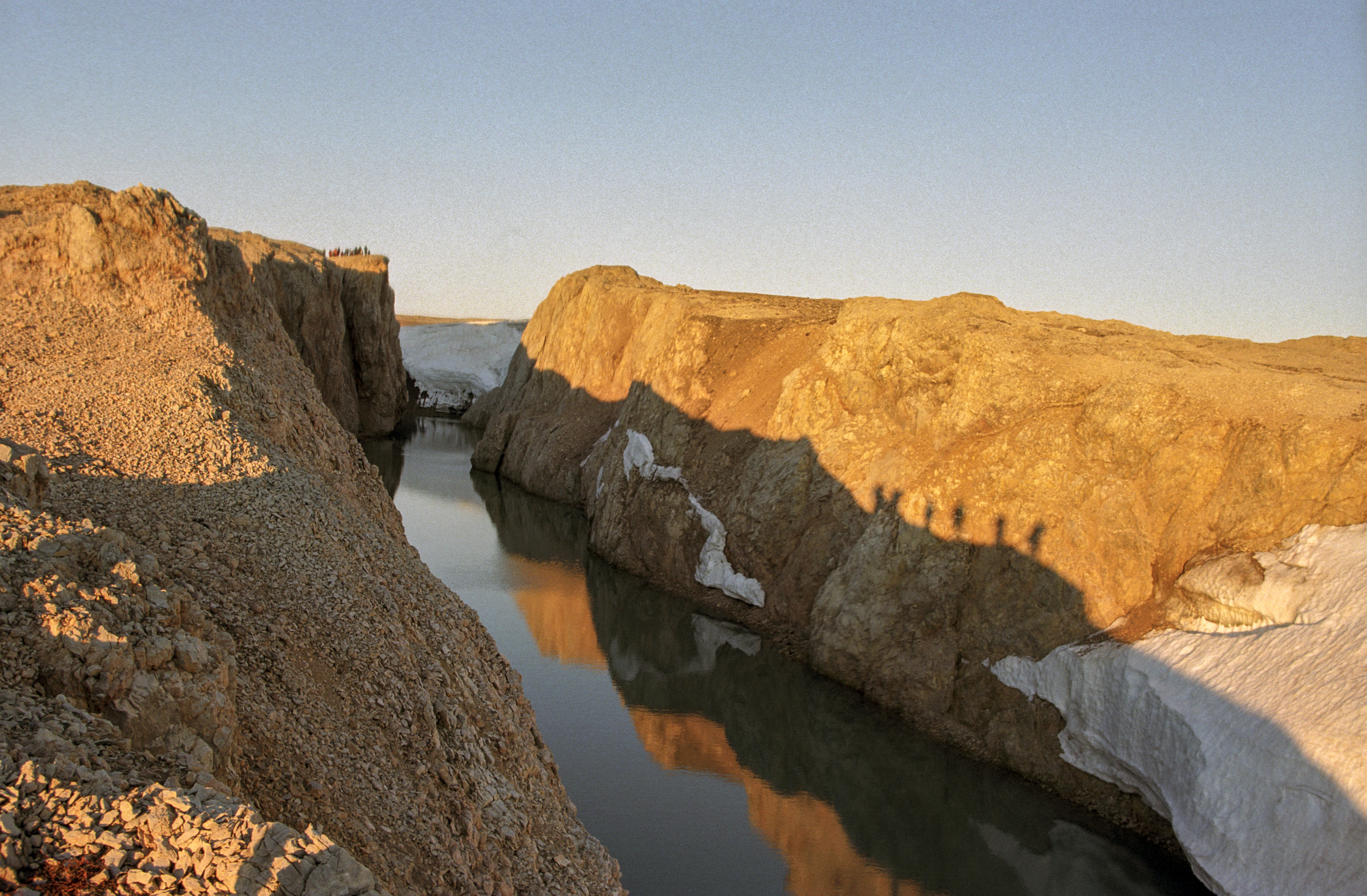 Svalbard, Nordaustlandet